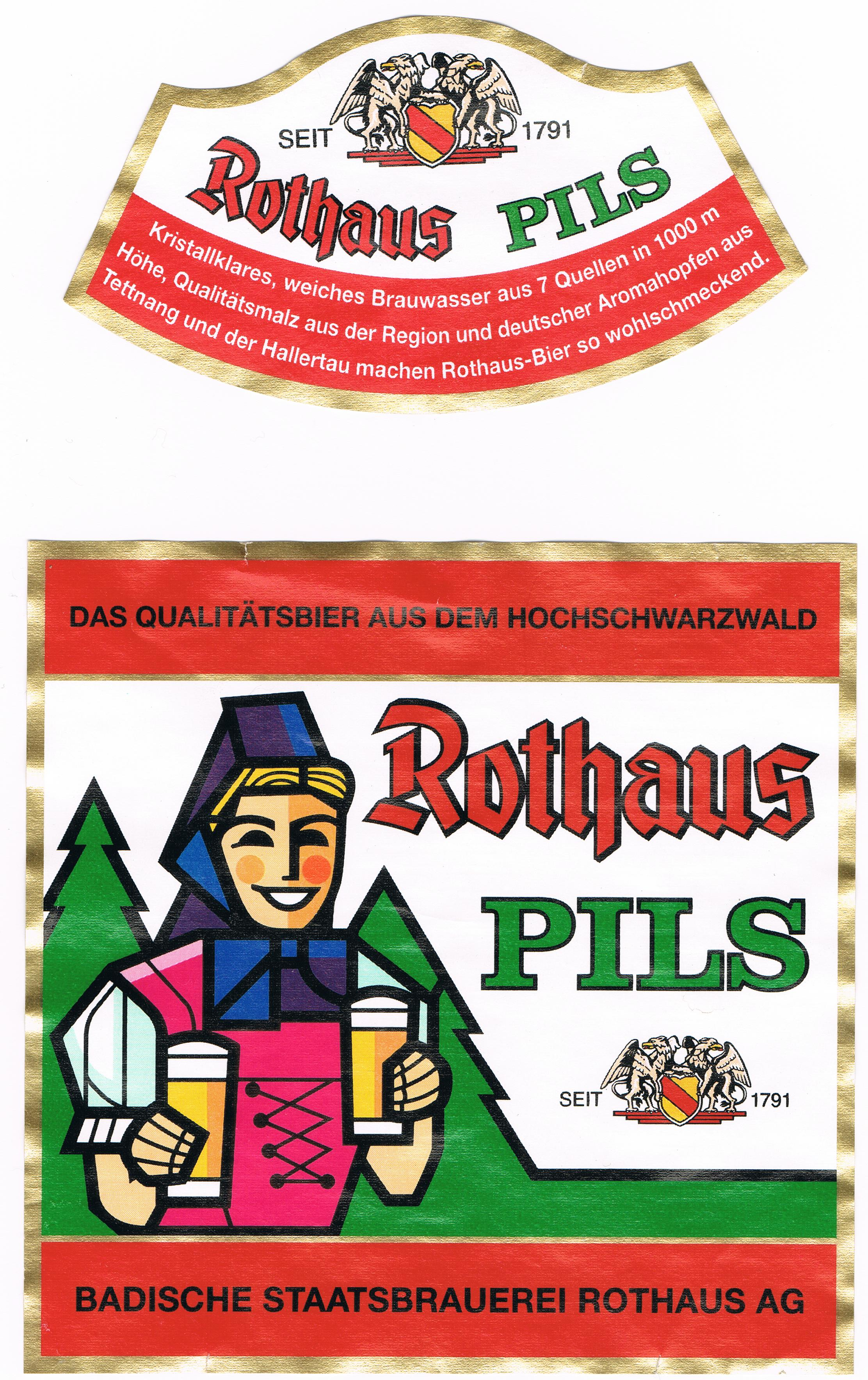 Etykieta piwa Rothaus